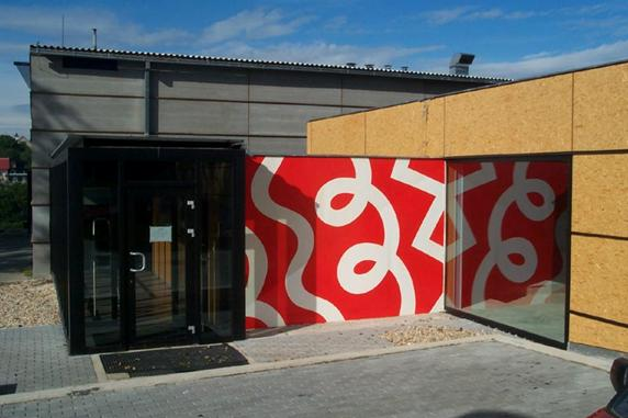 Sportovní hala v Litomyšli, nástěnná malba (2001), architekti Petr Hrůša a Petr Pelčák